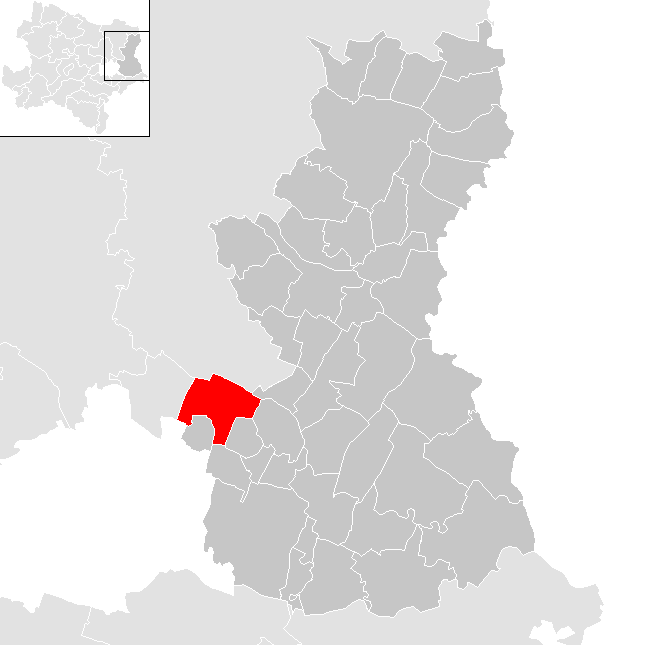 Bezirk Gänserndorf